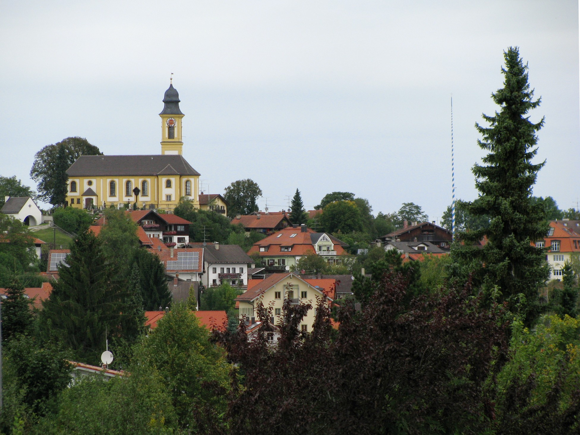 Ortszentrum von Hohenschäftlarn mit Kirche St. Georg von Süden